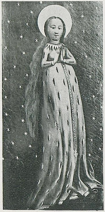 Vierge aux épis reproduite par Detzel